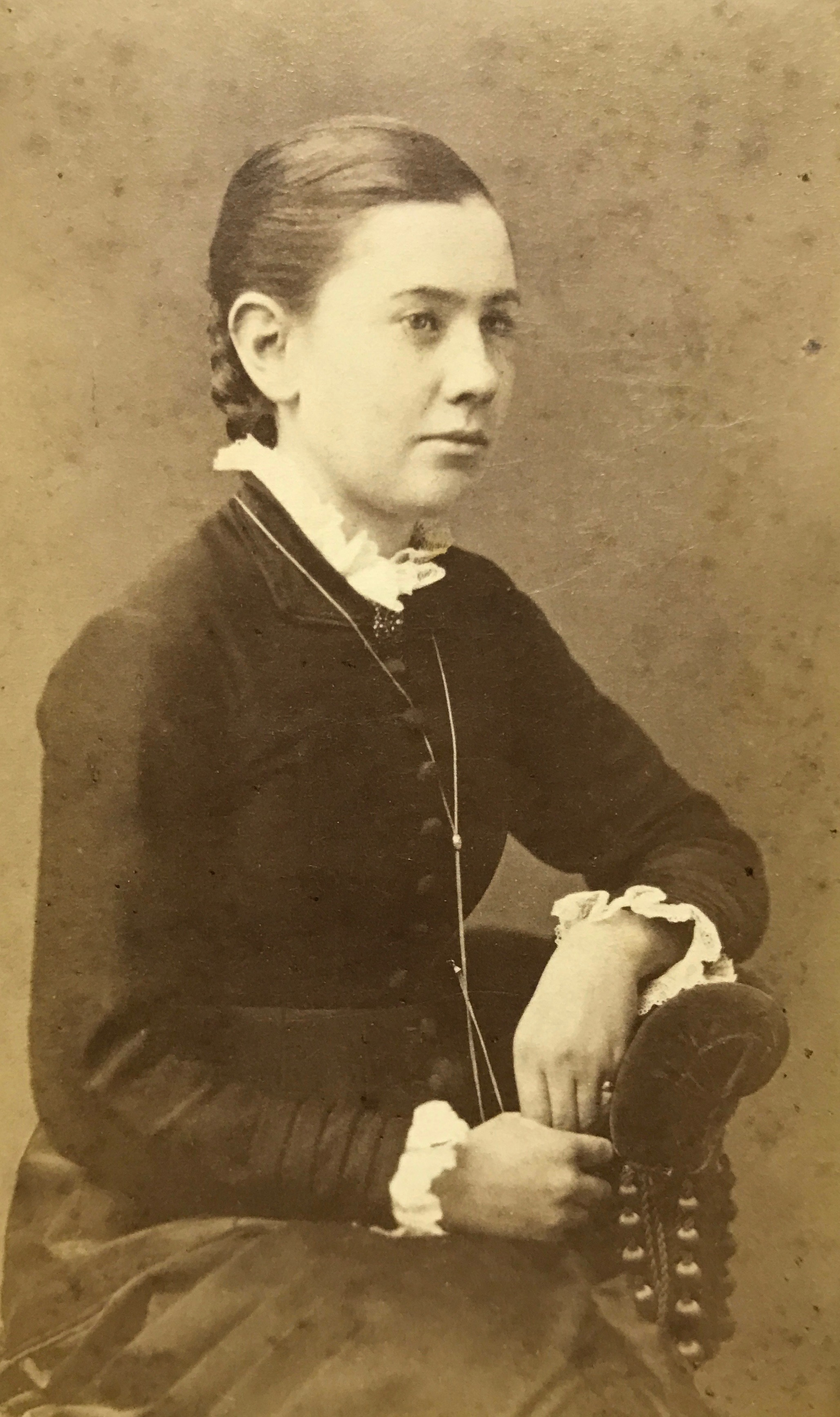 Konstnären Hildur Meijer